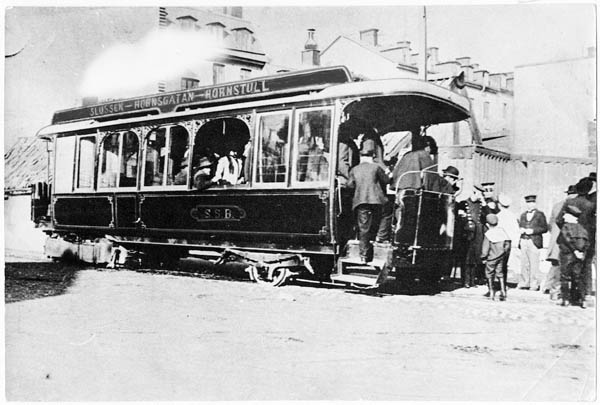 A Steam Tram used by Stockholms södra spårvägar (Stockholm Southern Tramways) in Stockholm, Sweden. In service 1887-1901.